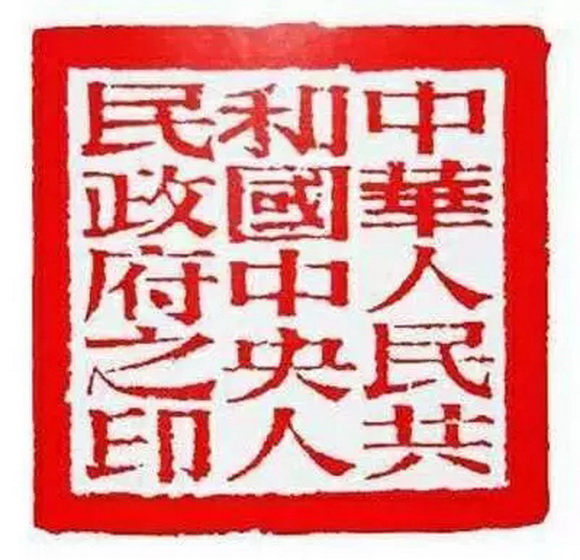 张樾丞所刻“中华人民共和国中央政府之印”的印样